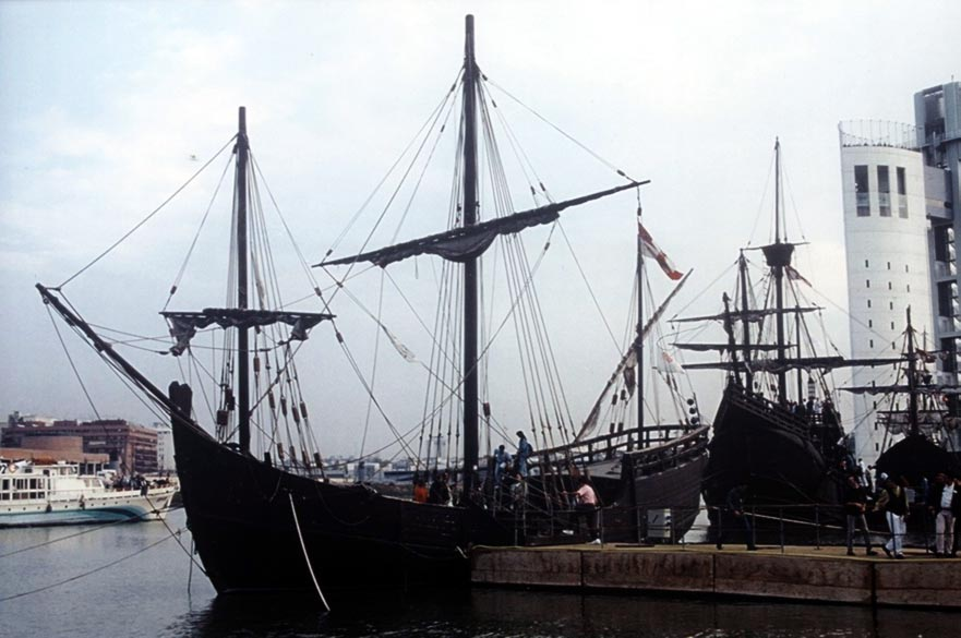 Réplica de las carabelas de Colón, Expo de Sevilla, 1992.